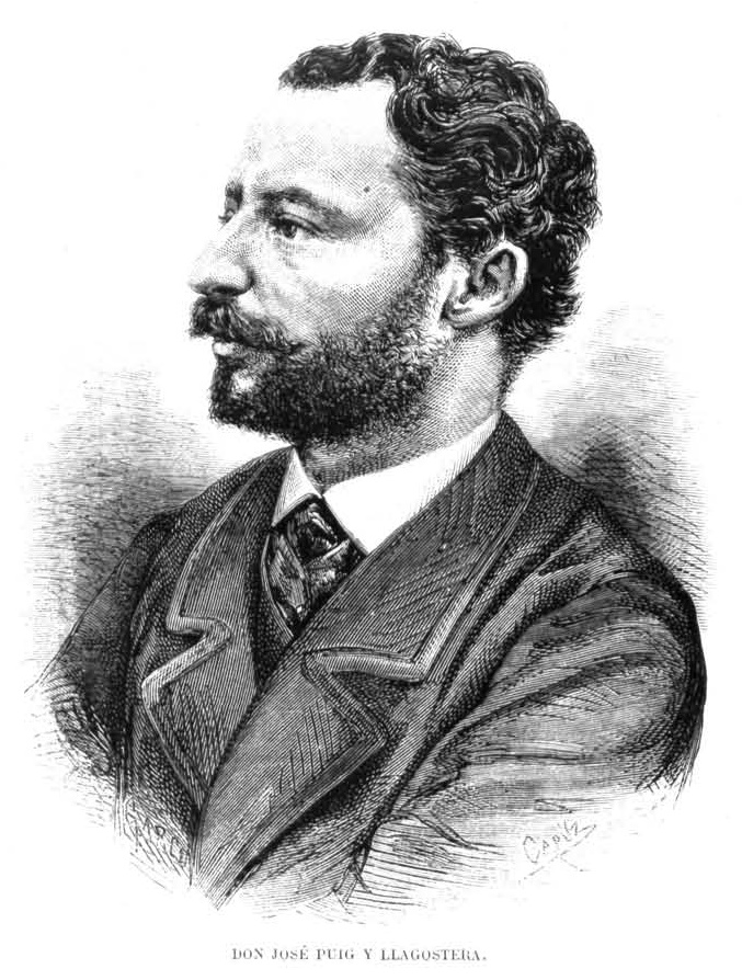 Retrato de José Puig y Llagostera, grabado de [Tomás Carlos] Capuz. La Ilustración Española y Americana, año XIV, nº 9, 25 de abril de 1870